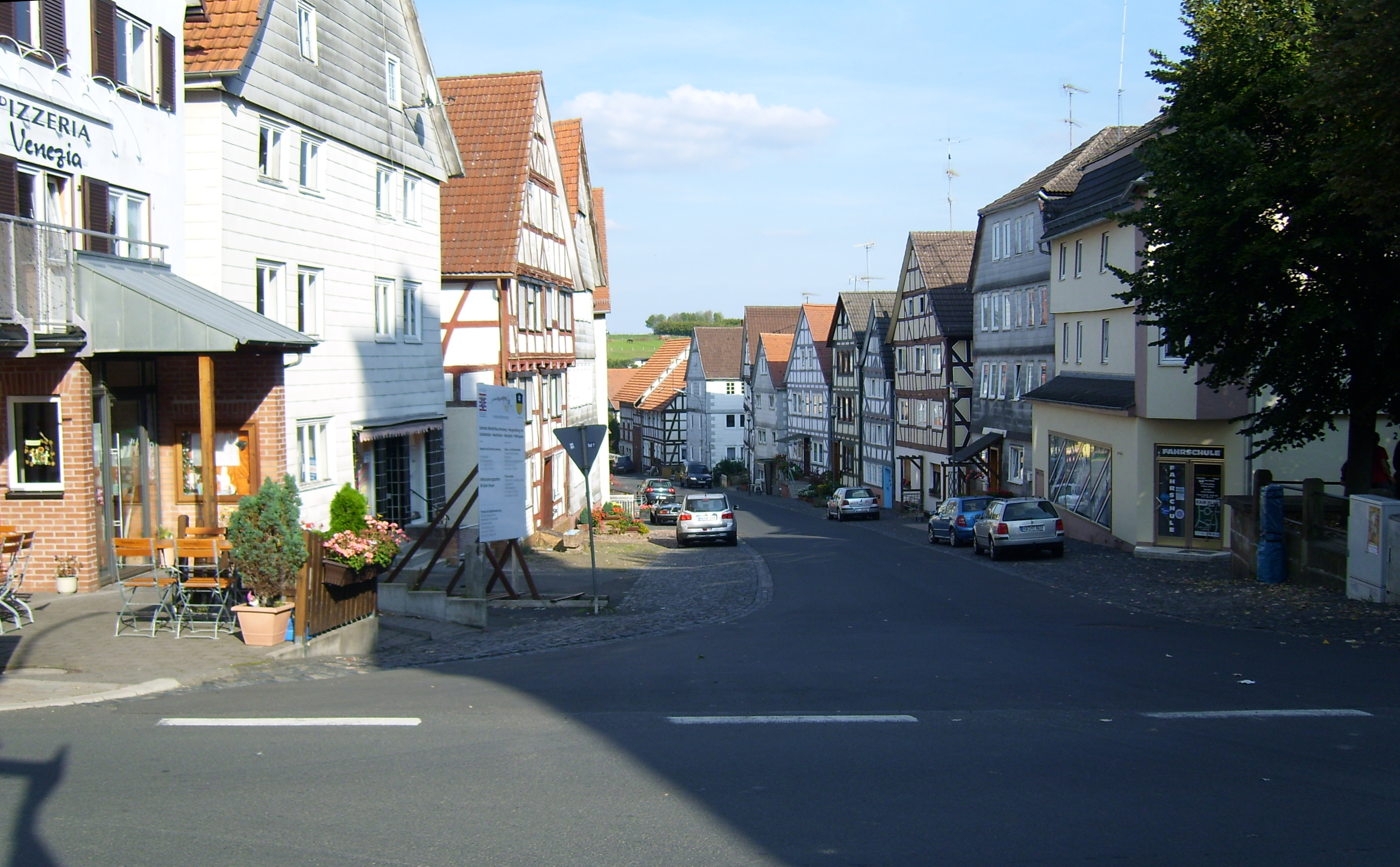 Die Marktstraße zweigt im Zentrum Rauschenbergs von Richtung Rathaus aus nach Ostnordosten ab und verlängert die Schlossstraße